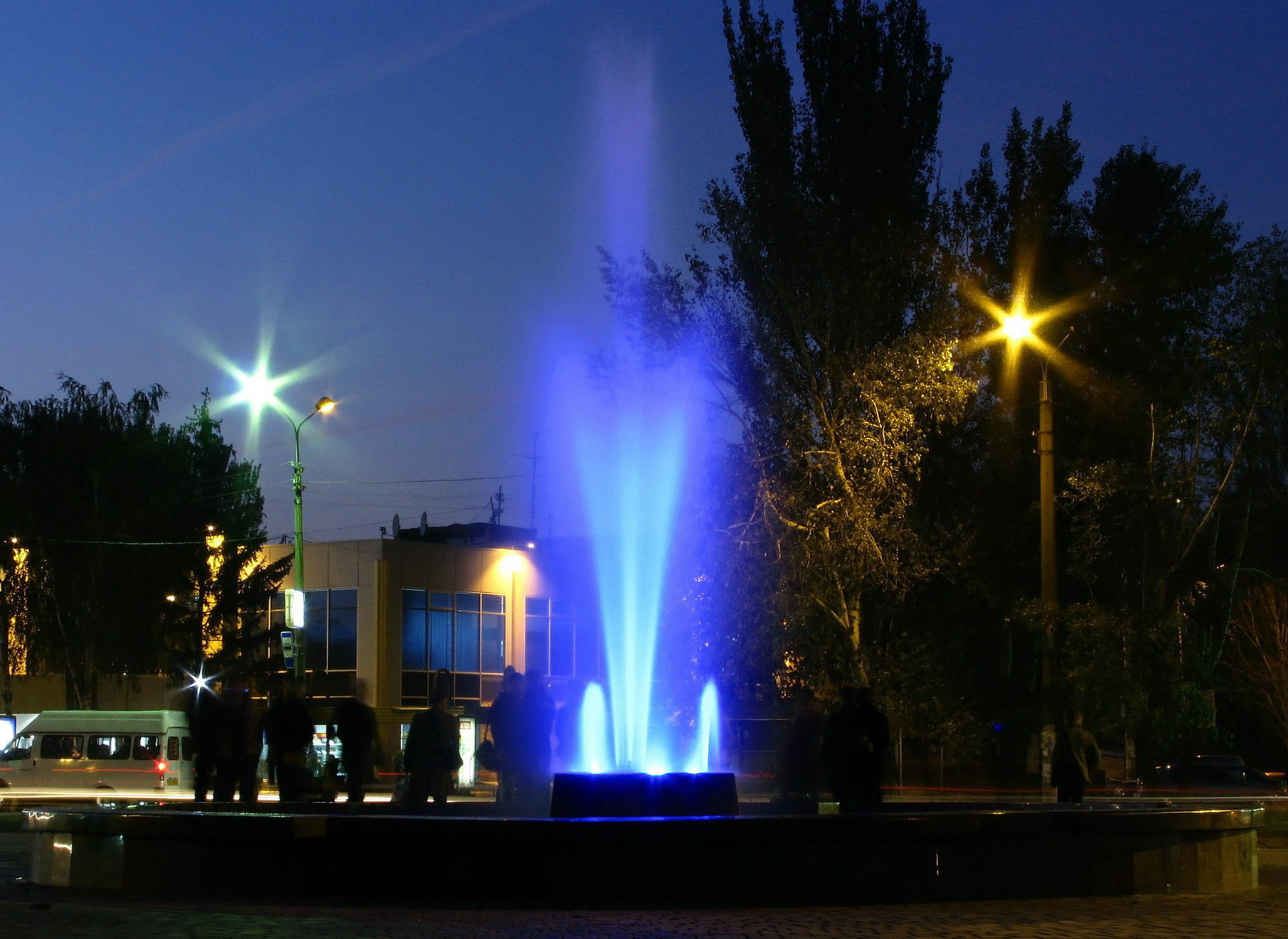 Цветной фонтан в центре Никополя